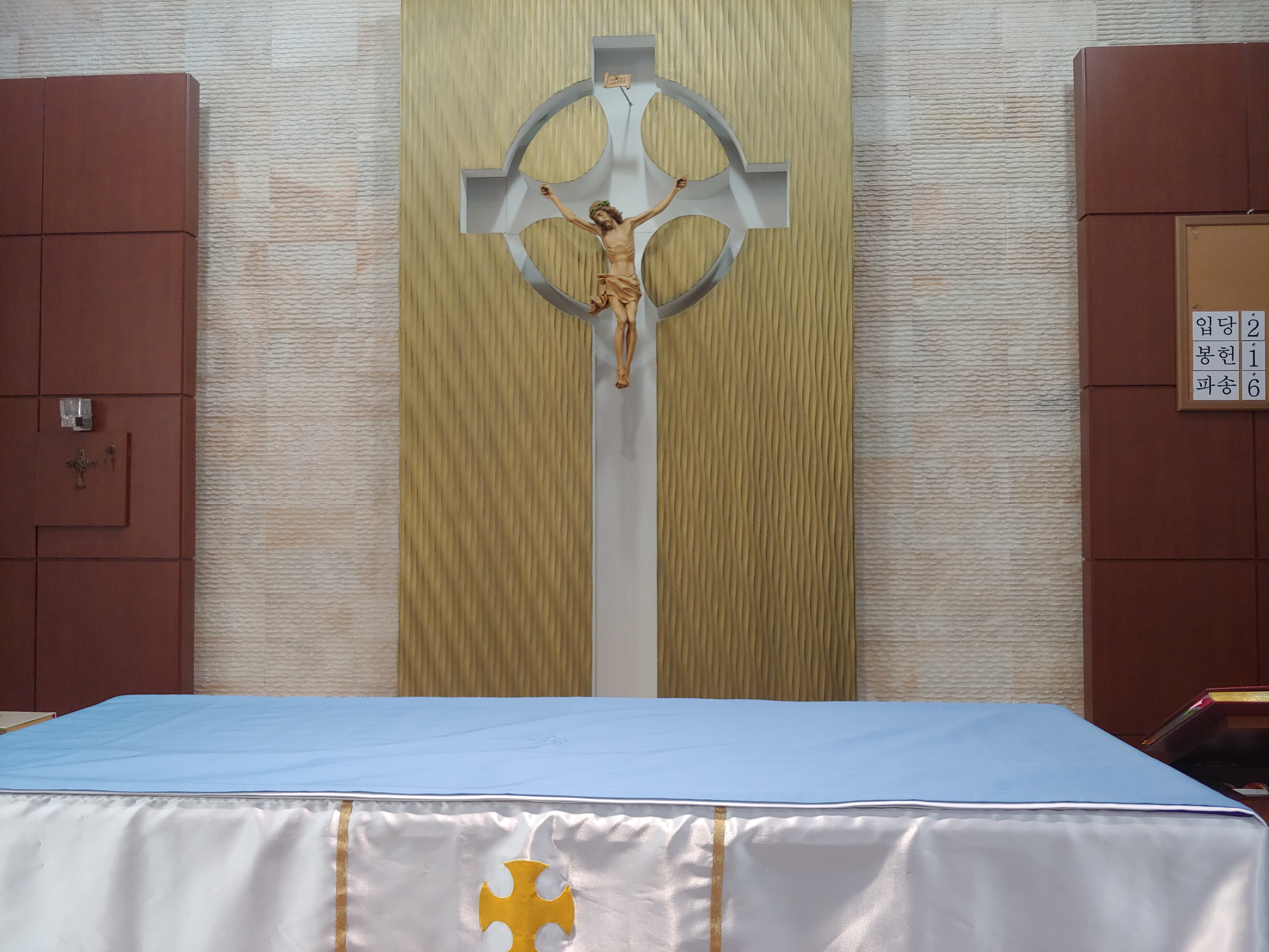 성공회내동교회 소성전